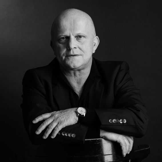 Foto von Georg Pommer (Musiker)